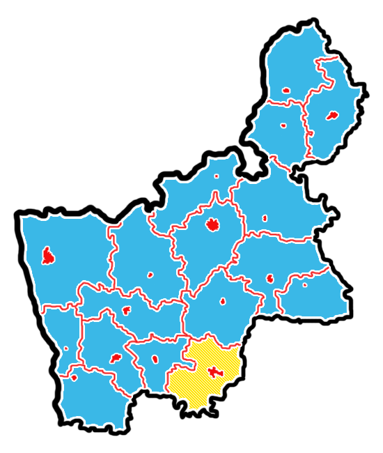 Map of Grodno Oblast, Slonim Region.